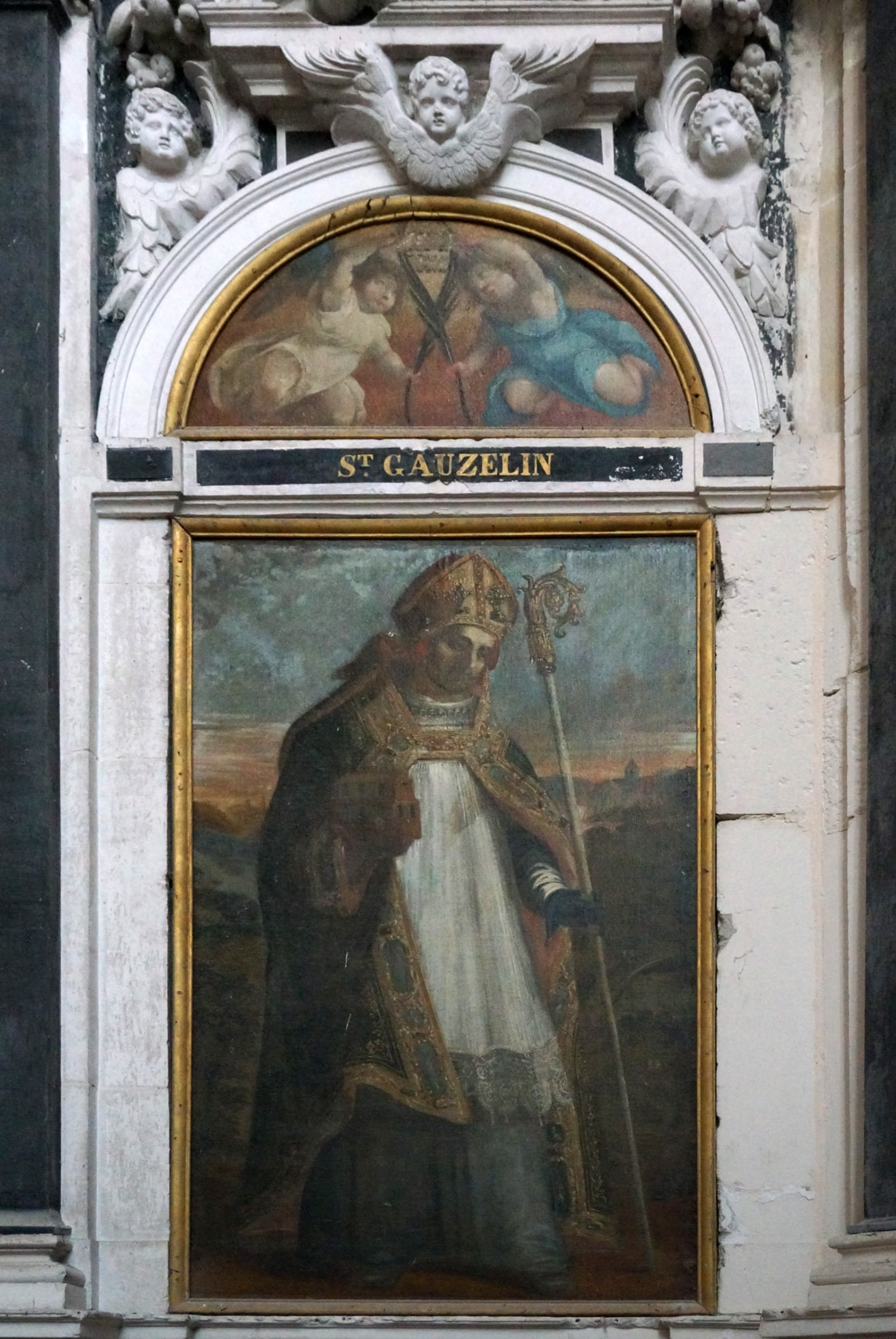 Toul (Meurthe-et-Moselle, France), cathédrale St Étienne, Saint Gauzelin, évêque de Toul, anonyme.